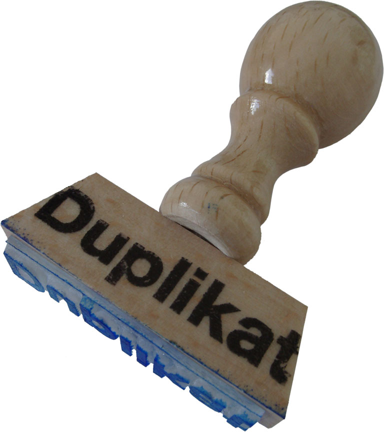 Stempel